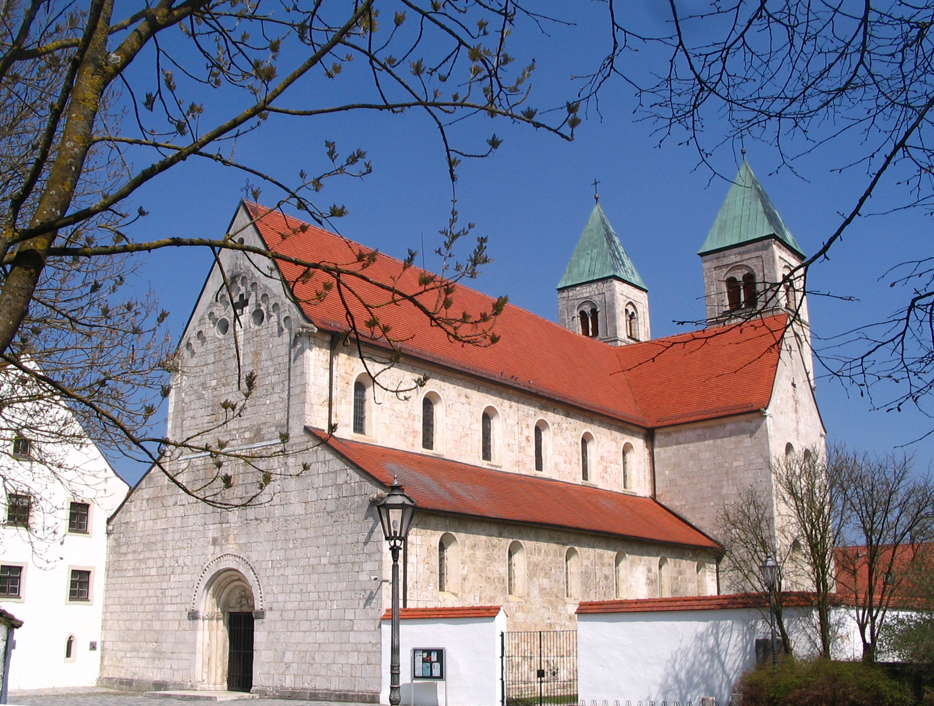 Die ehemalige Klosterkirche und jetzige Pfarrkirche Maria Immaculata in Biburg zählt zu den bedeutendsten romanischen Baudenkmälern Altbayerns.